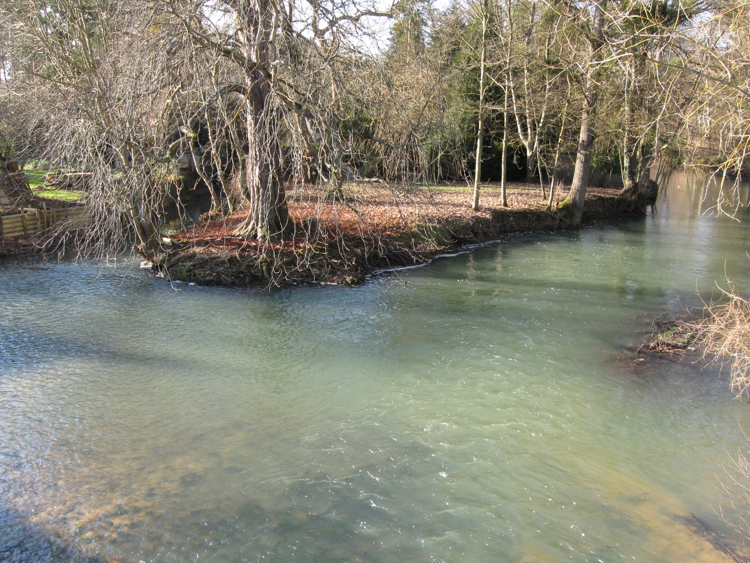 l'Ouanne marquant la limite entre Saint-Germain-des-Prés (rive droite du bras principal, celui sur la droite de la photo) et Gy-les-Nonains (rive gauche du bras principal). Le bras secondaire, proche de la maison, est sur Gy-les-Nonains. Vue depuis la D973, vers le sud-ouest.